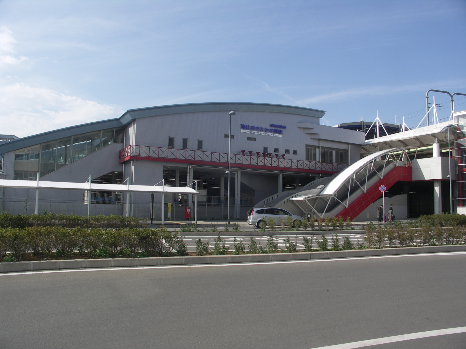 Nagareyama Otakanomori station east, Tsukuba Express, Tobu-Noda Line, Chiba, Japan, 流山おおたかの森駅東口